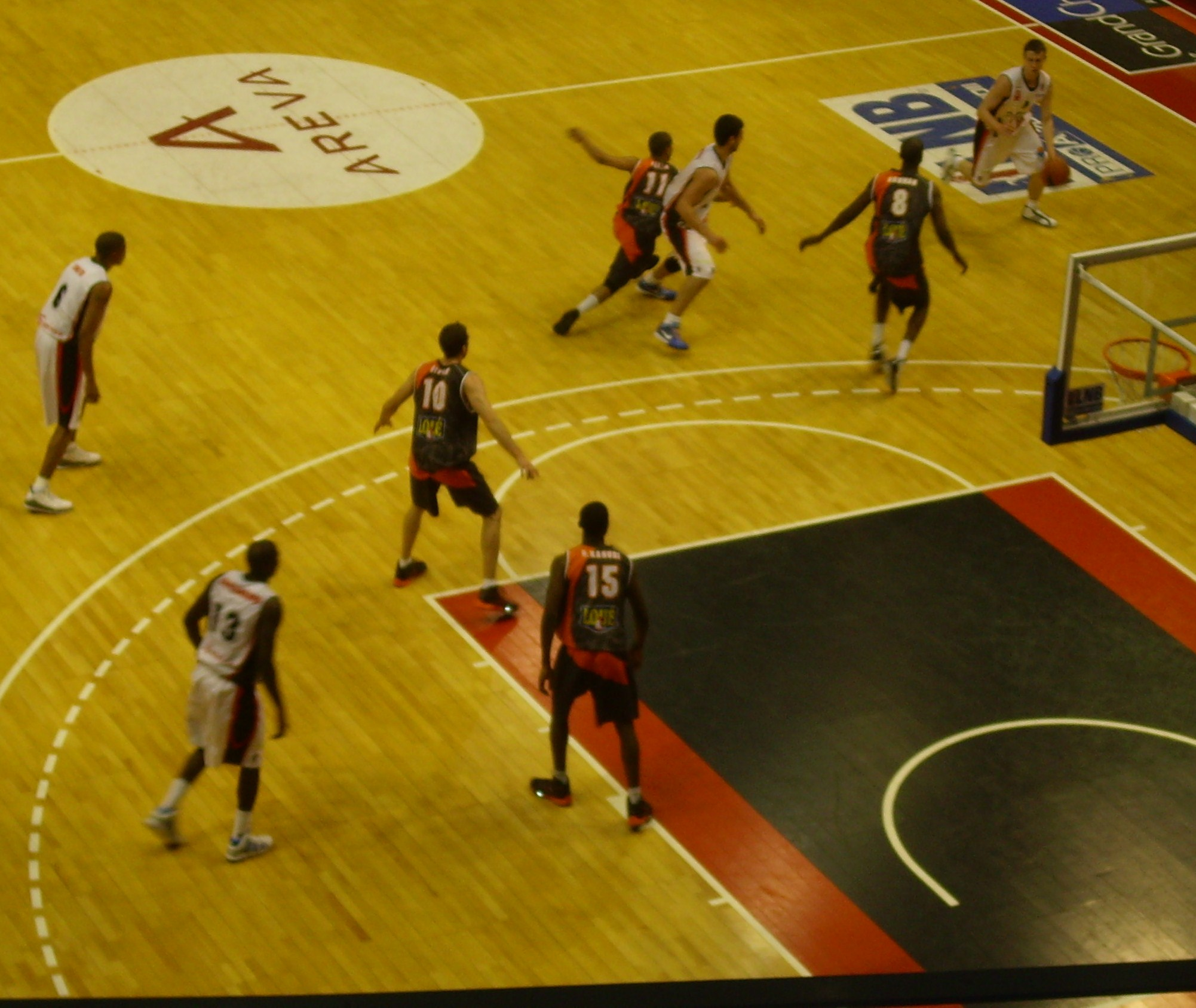 Match de l'Elan Chalon contre Le Mans lors de la saison de Pro A 2010-2011 (19-02-11)